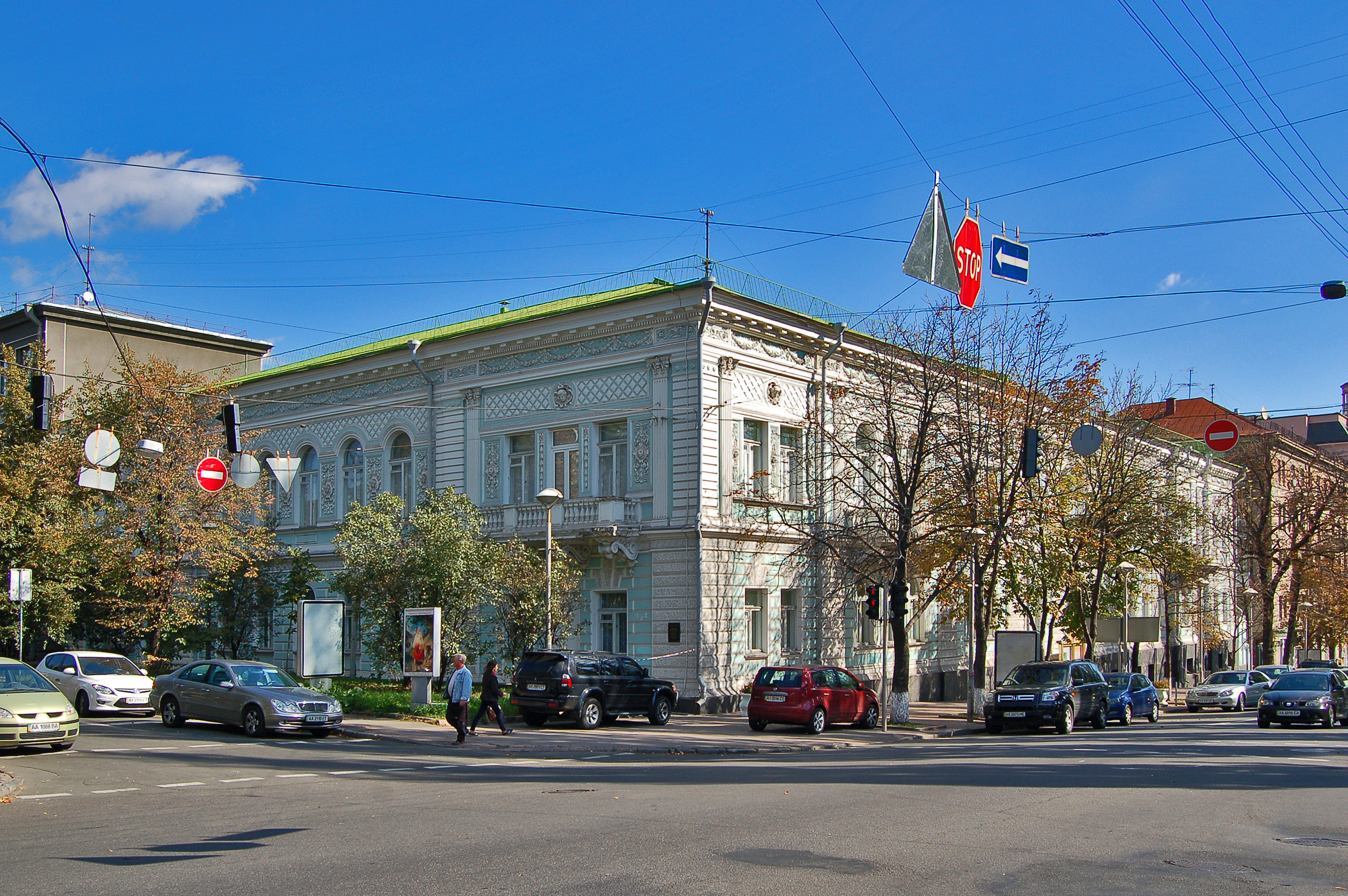 Будинок № 12 по бульвару Тараса Шевченка у Києві